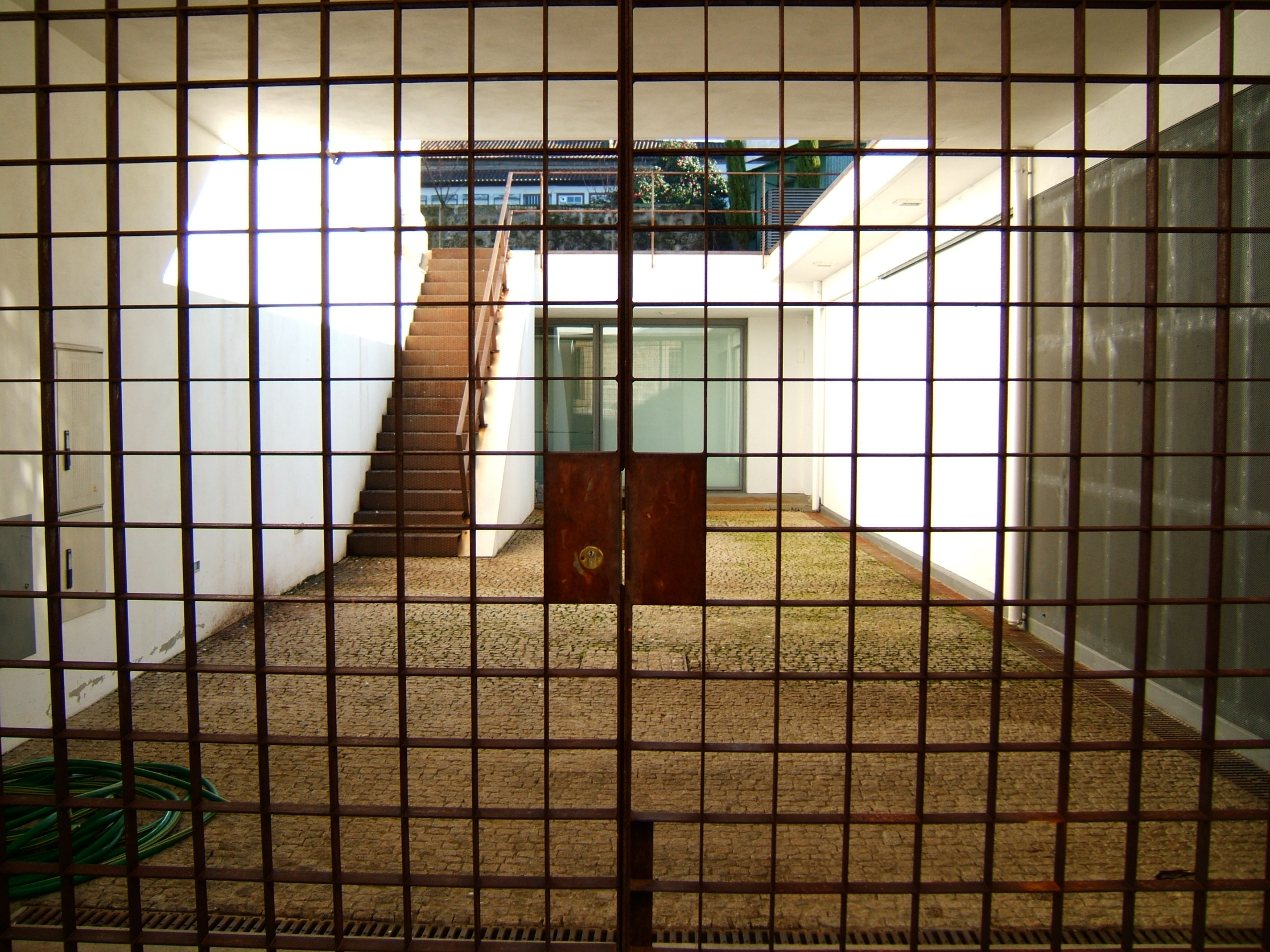 Portão no Arquivo Municipal Alfredo Pimenta.